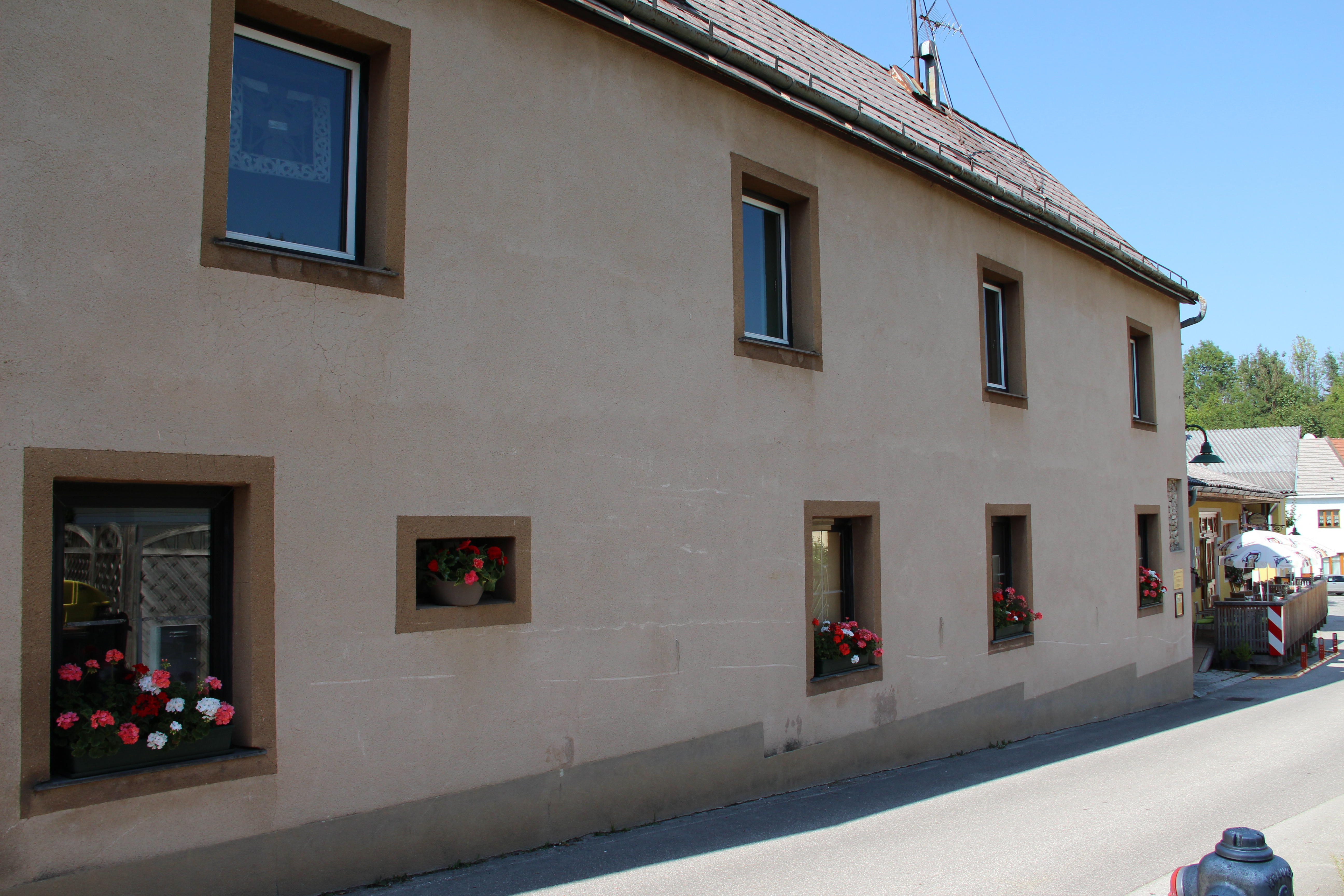 Heimatmuseum, ehem. Schulhaus